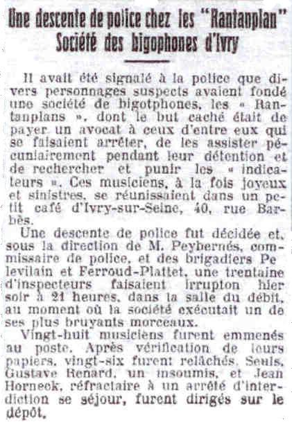 Article sur les Rantanplans d'Ivry, page 3, 5ème colonne.